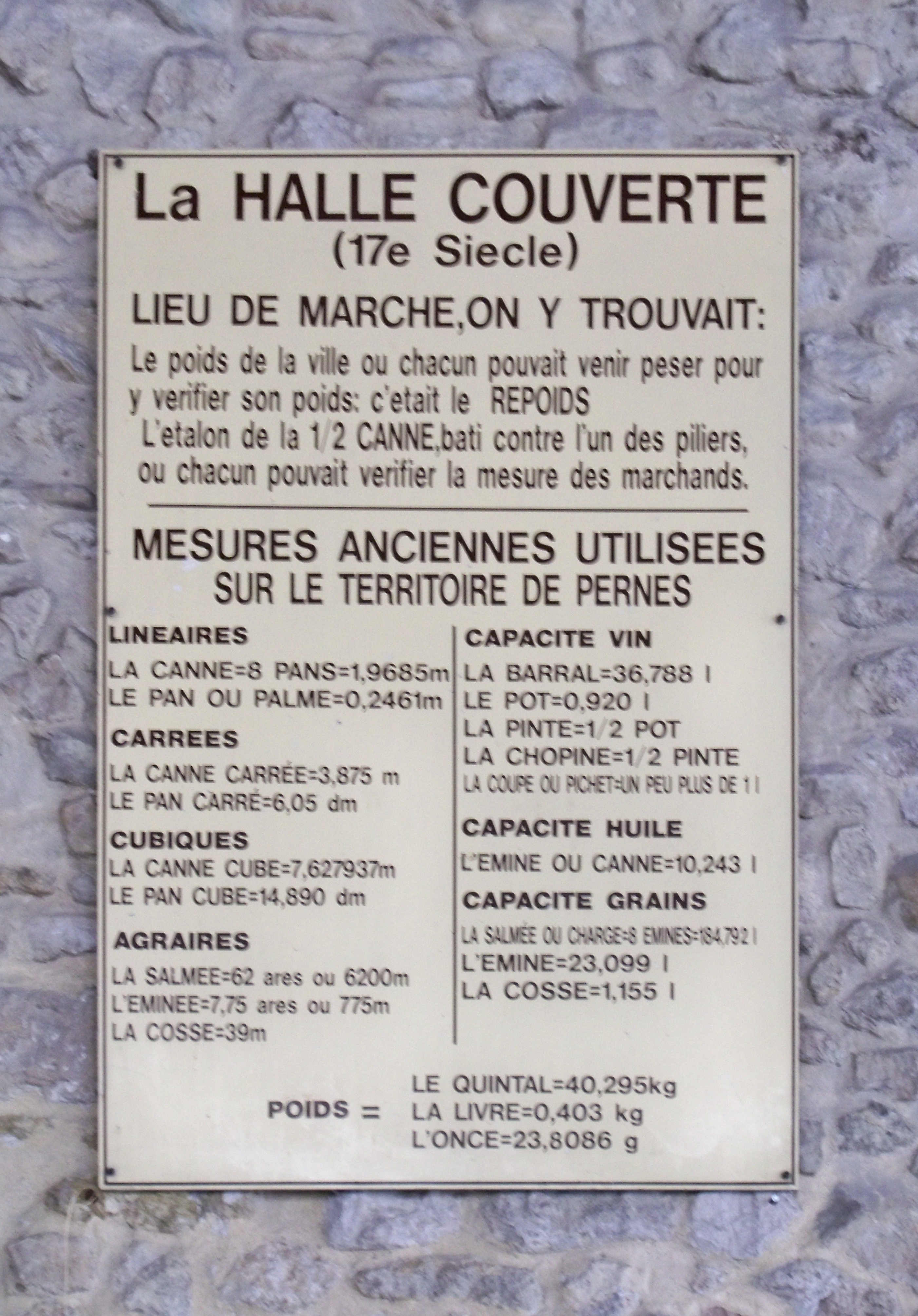 Tableau des unités de mesures utilisées au XVIIe siècle à Pernes les Fontaines, Vaucluse, France